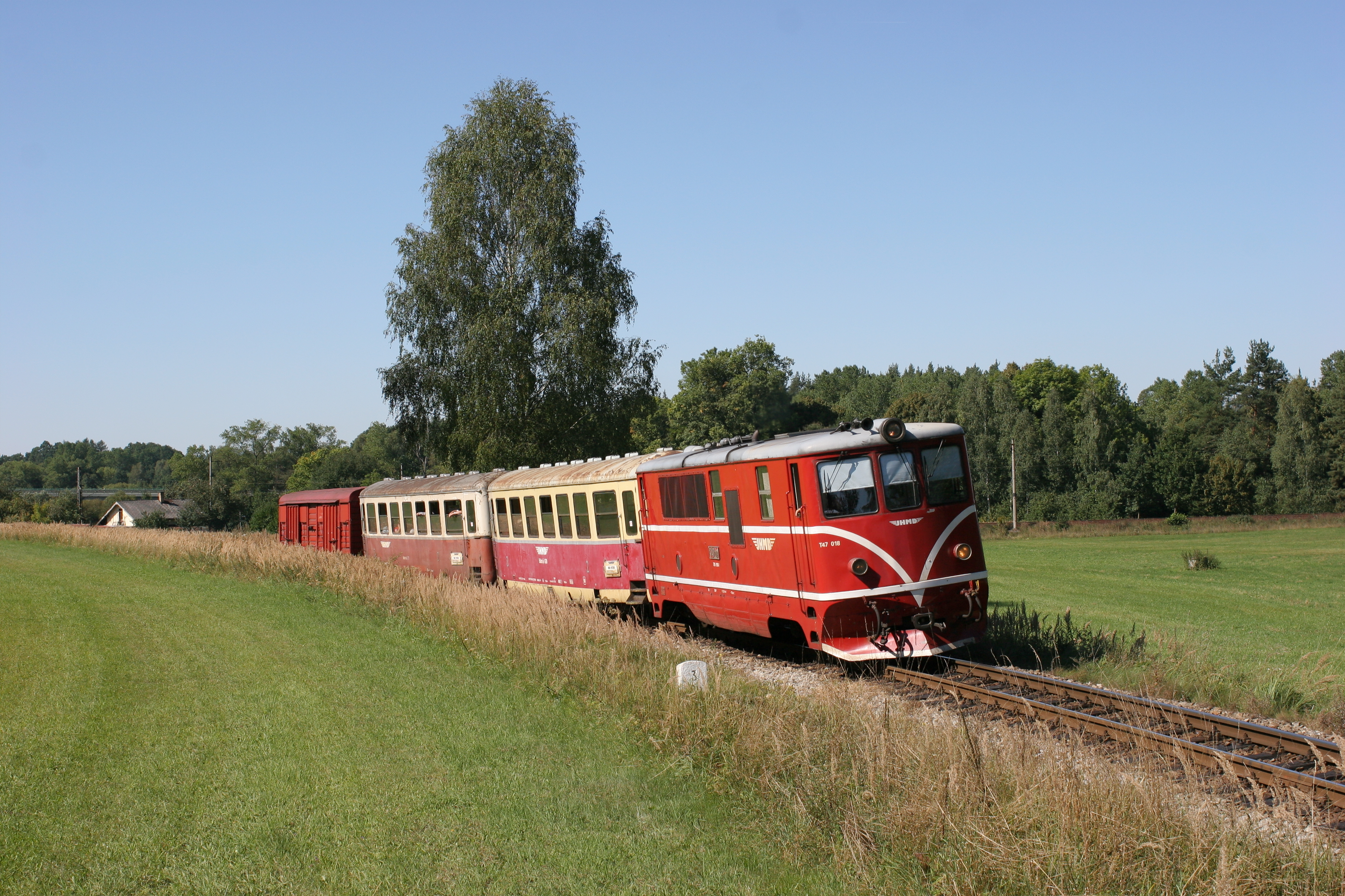 fsu